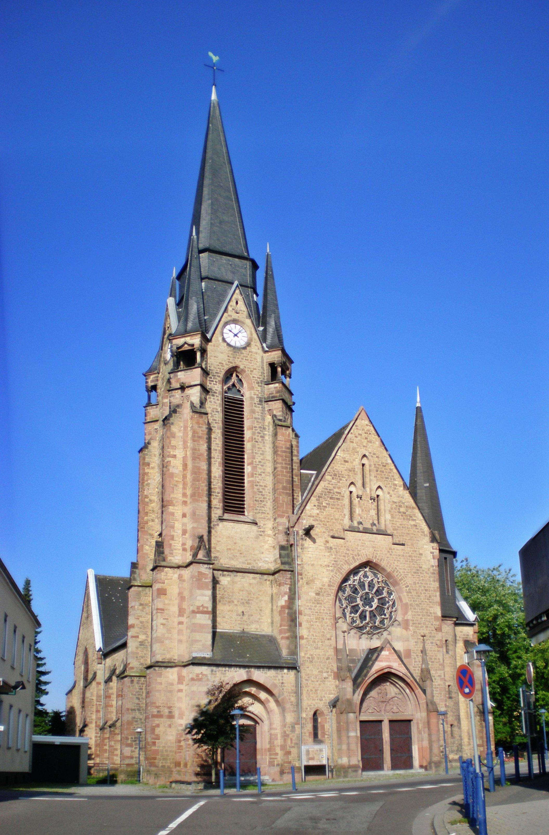 Kath. Kirche in Spiesen-Elversberg